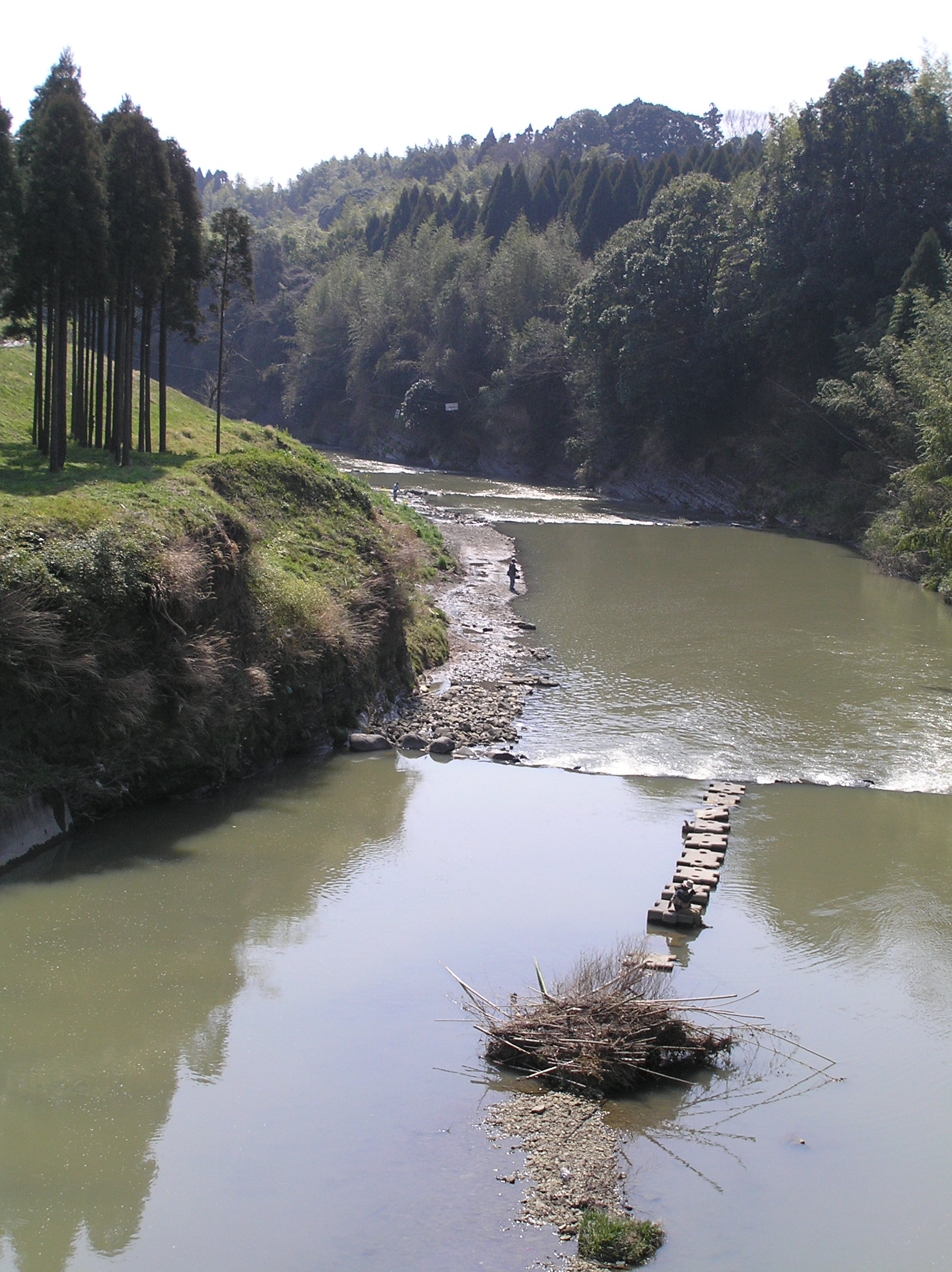 寿恵比楼旅館横を流れる夷隅川 ～photo by Autumn Snake【おぉたむすねィく探検隊】